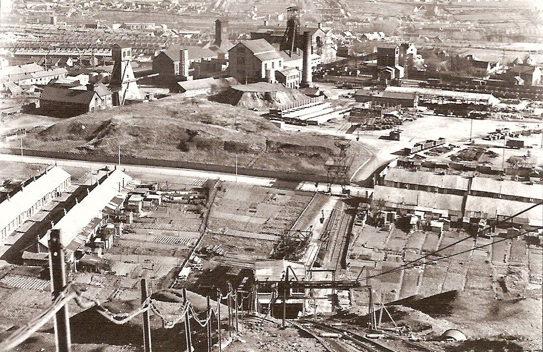 Fosse 3 vue d'en haut du terril